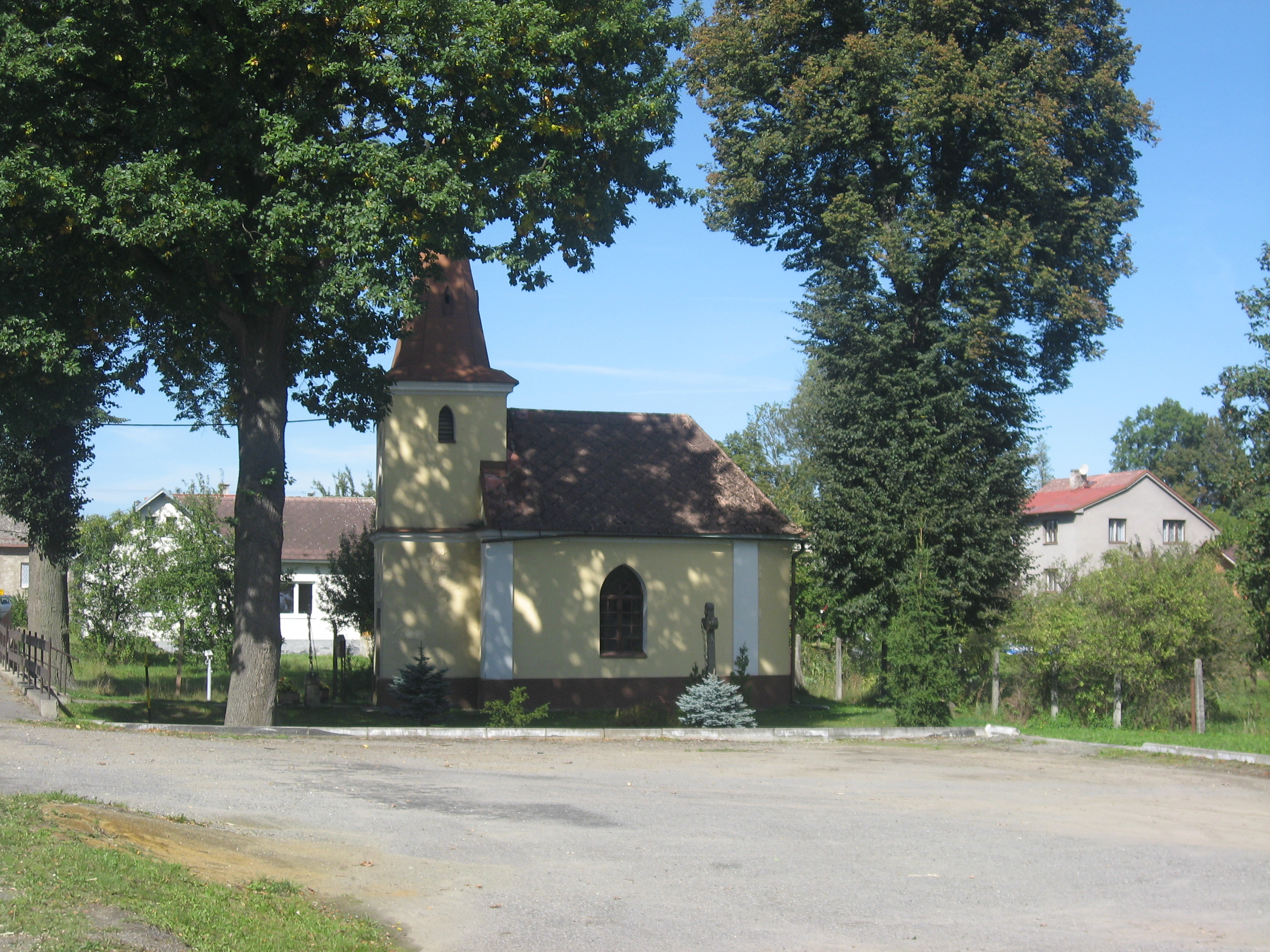 Kejžlice, kaple